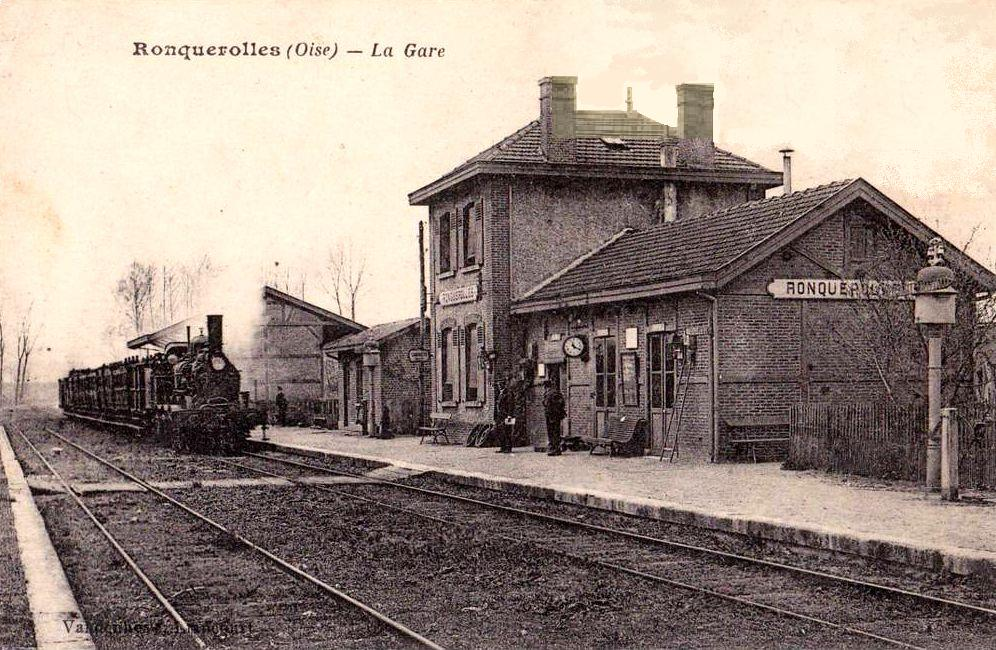 La gare côté voies.